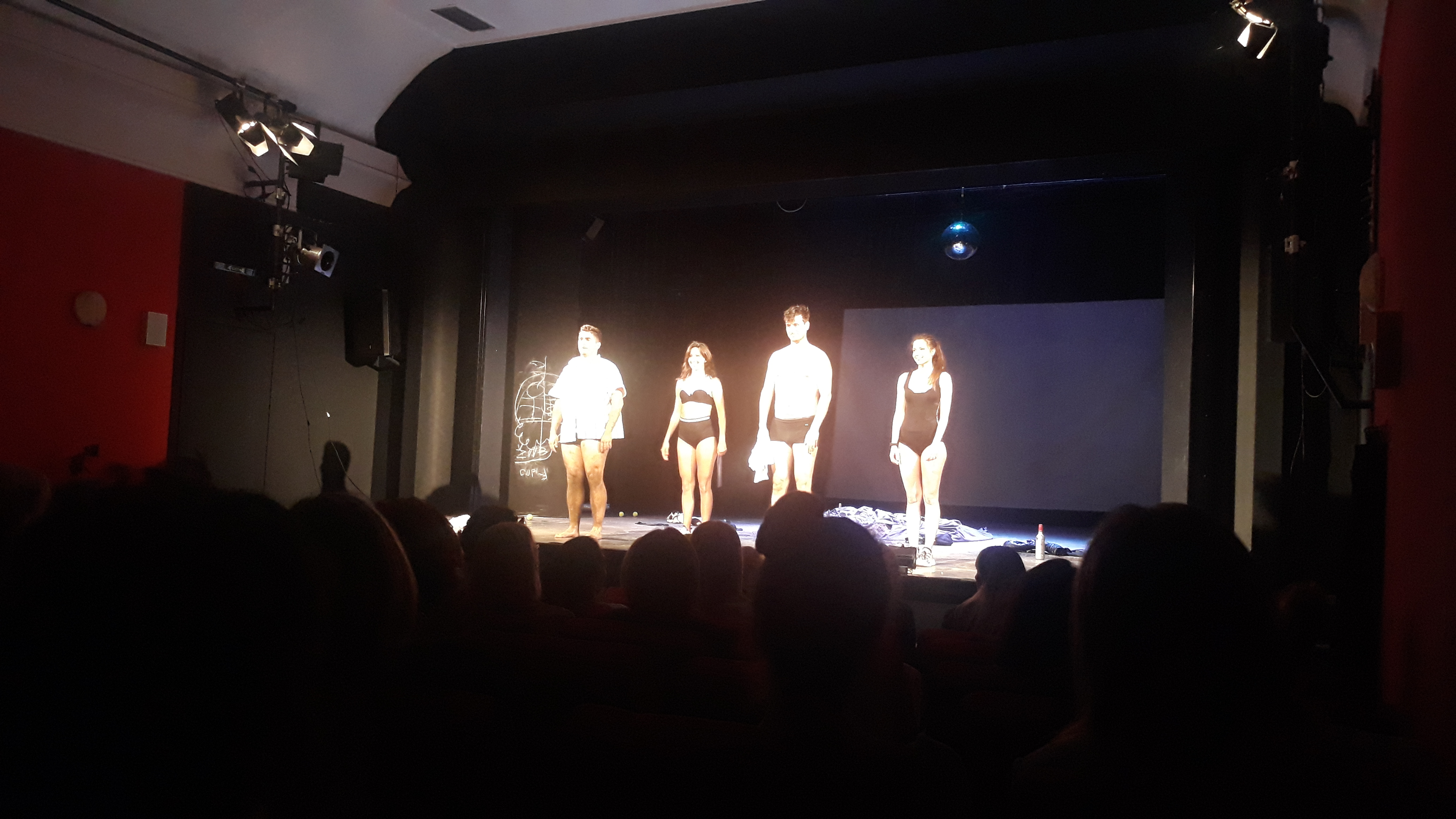 Кристина Пајкић, Страхиња Баровић, Милош Војновић и Јована Пантић након извођења представе Претпоследња панда или Статика, Шабачког позоришта, на затварању 55.Фестивала професионалних позоришта Србије „Јоаким Вујић“ у Краљеву.